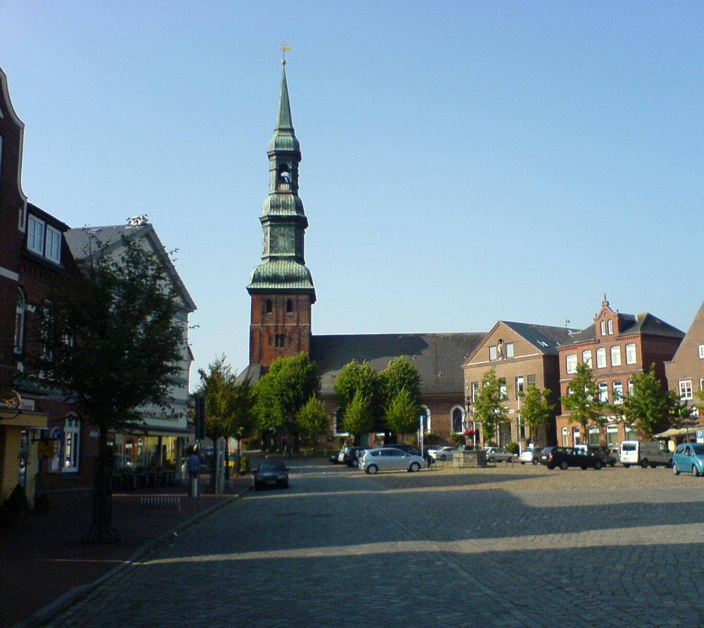 tönning markt u. kirche